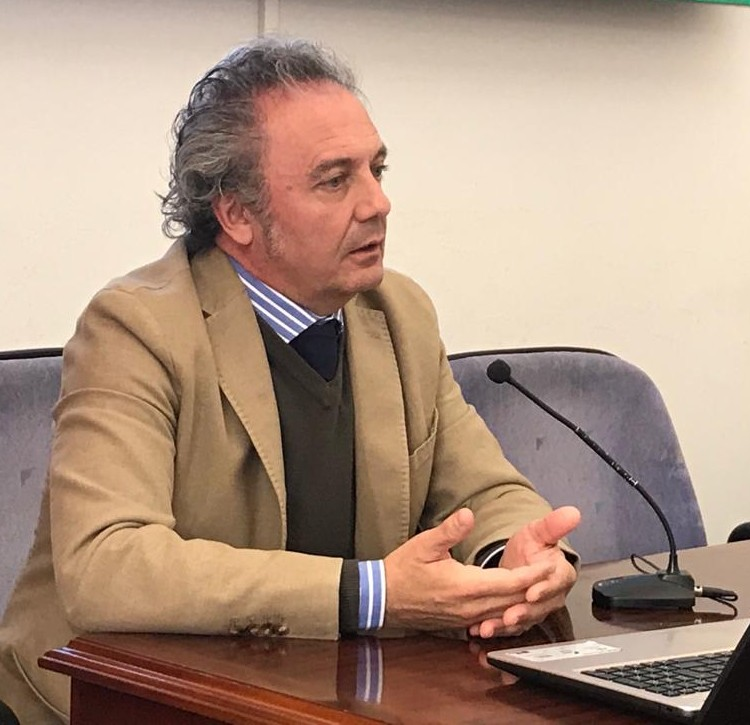 Conferencia. Facultad de Filología. Universidad de Sevilla. 27/02/2020